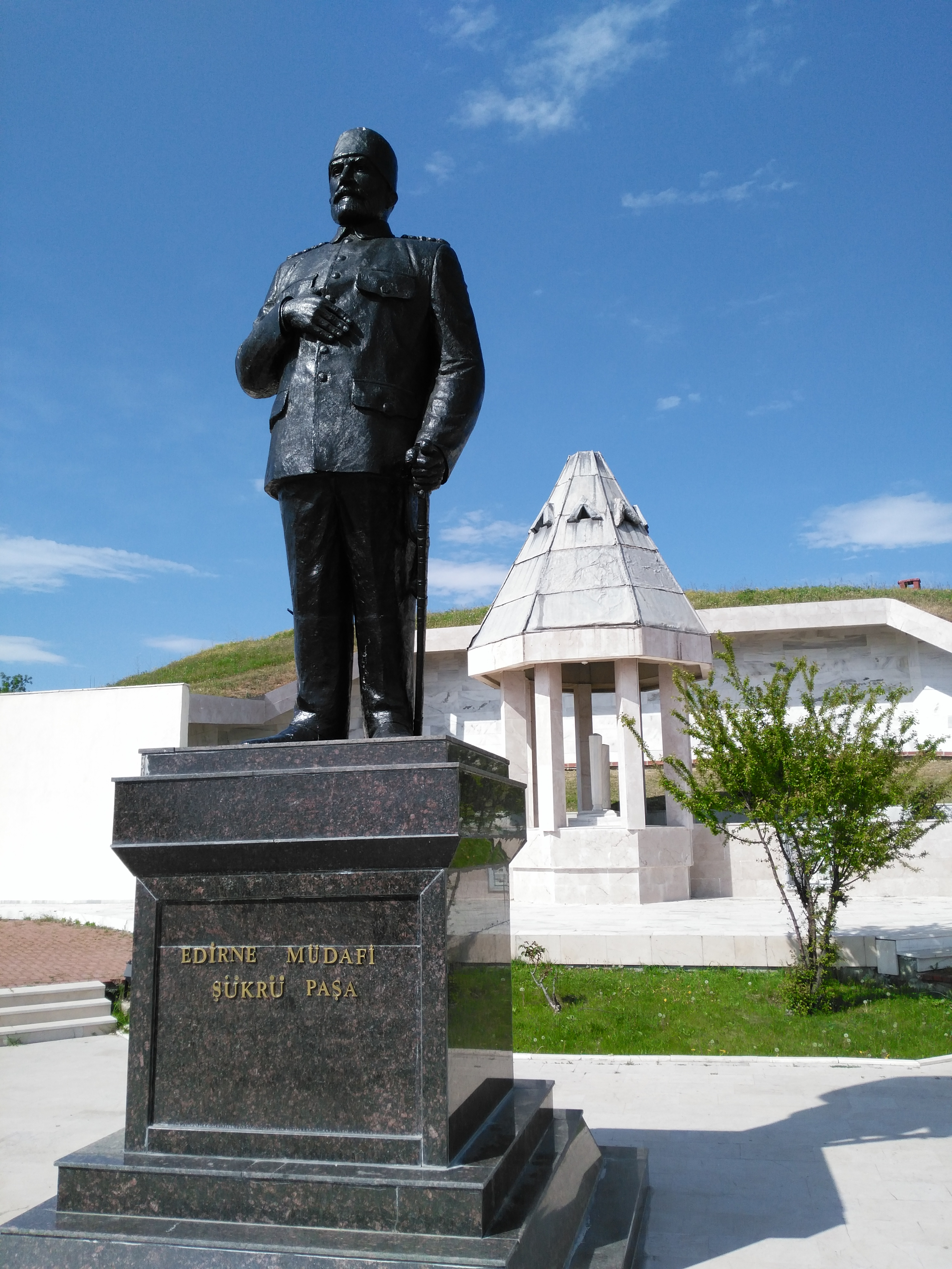 Mehmed Şükrü Paşa'nın Edirne'deki anıtı.